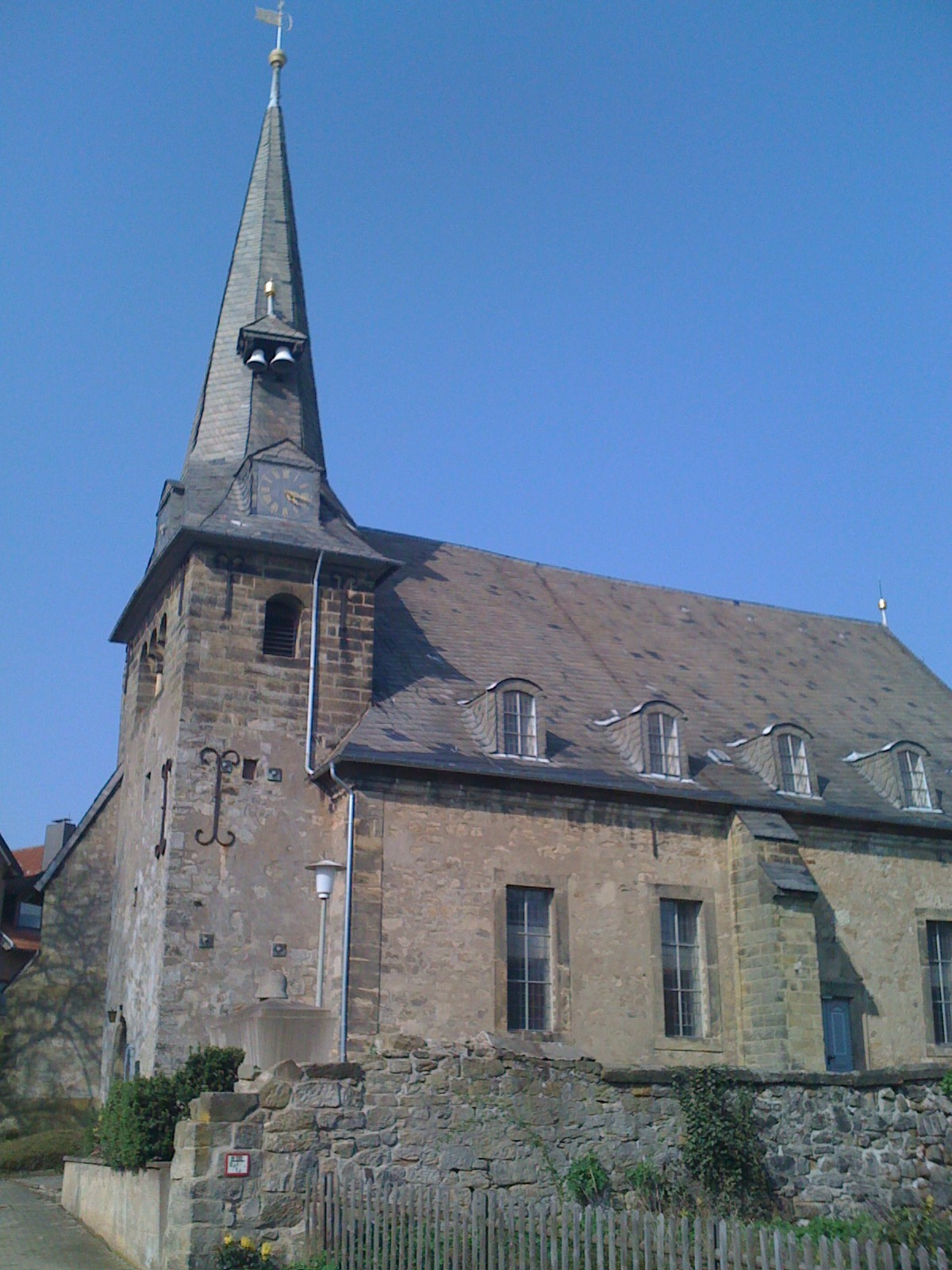 St. Andreaskirche in Langelsheim von Süden